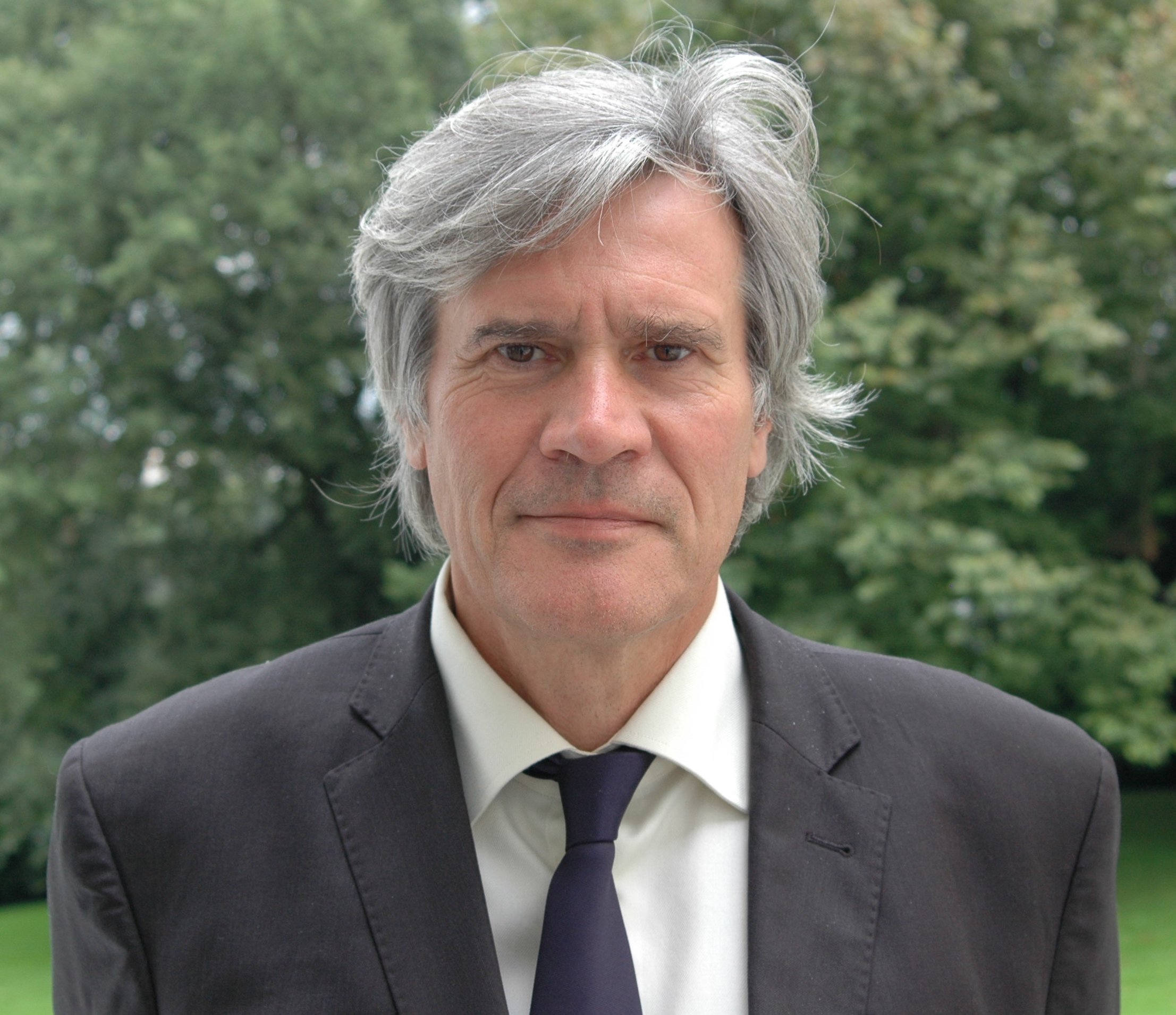 Französischer Landwirtschaftsminister in der Villa Hammerschmidt beim Treffen der Agrarminister des Weimarer Dreiecks